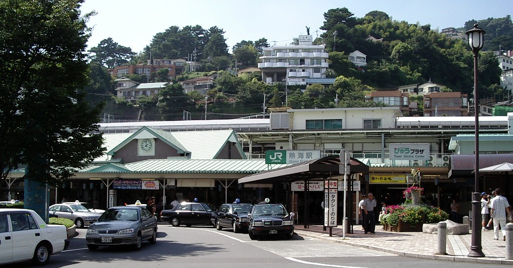 Atami Station